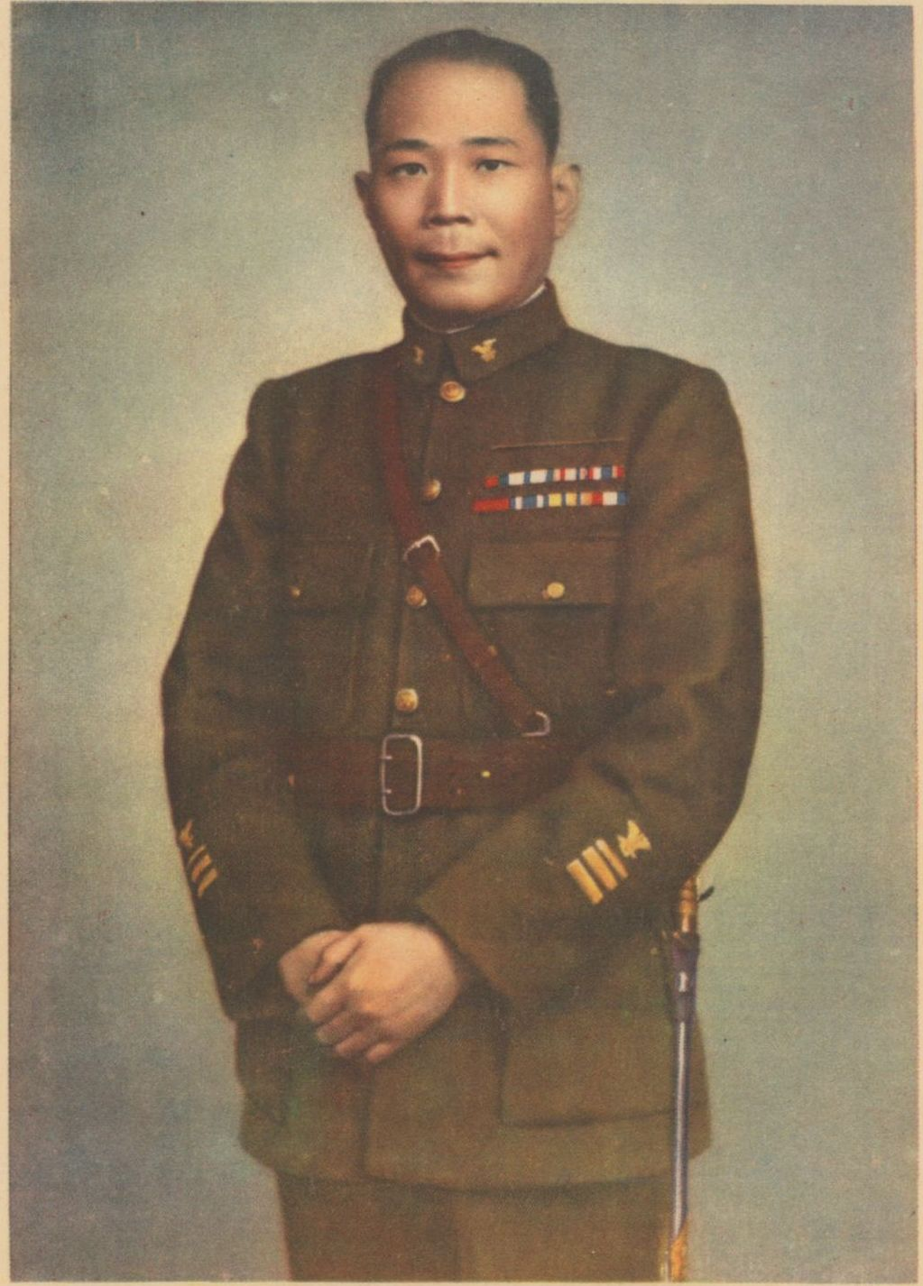 中文（中国大陆）: 中國空軍抗戰史畫插圖